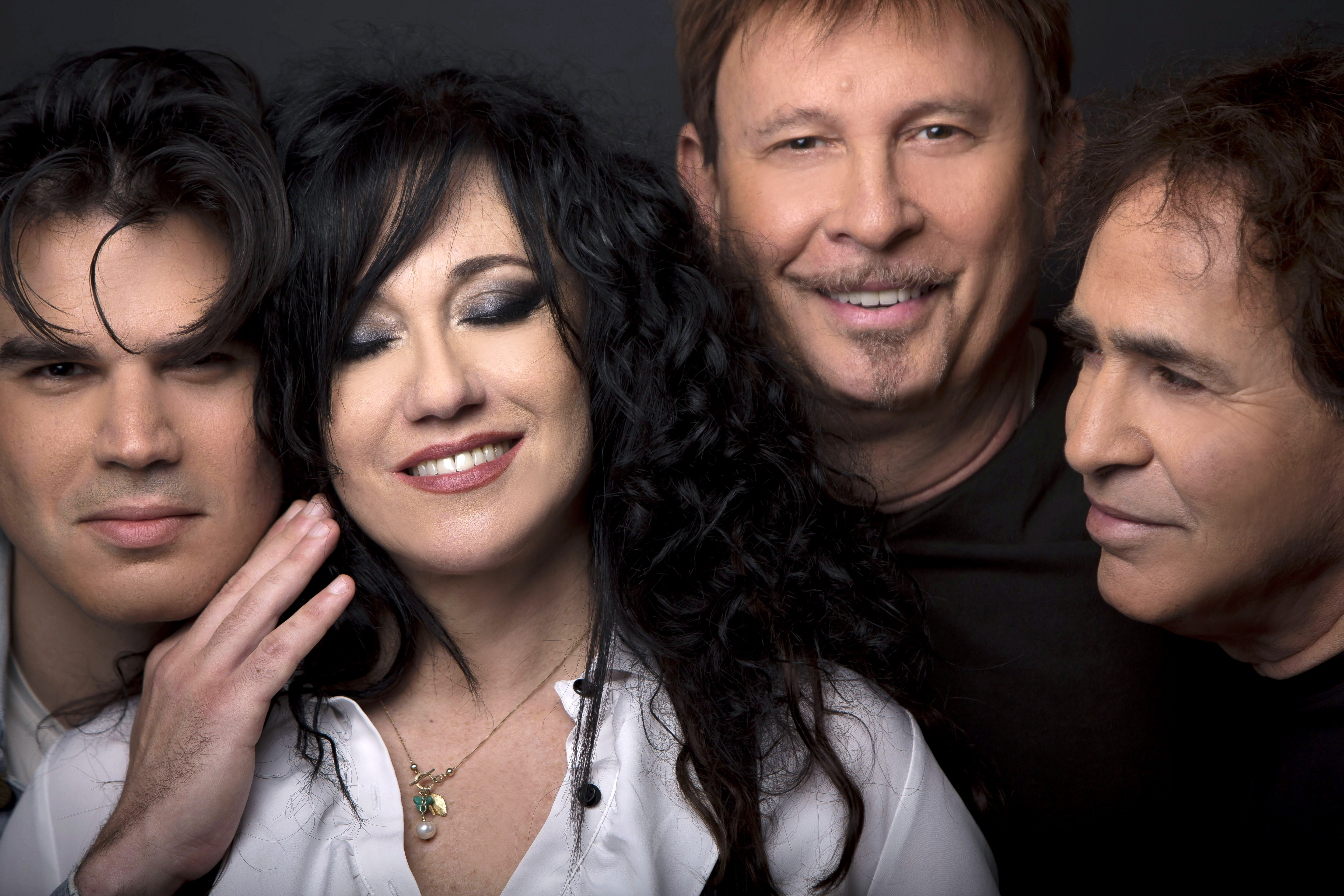 להקת הכל עובר חביבי 2013(את יובל דור החליף משה סימן טוב)